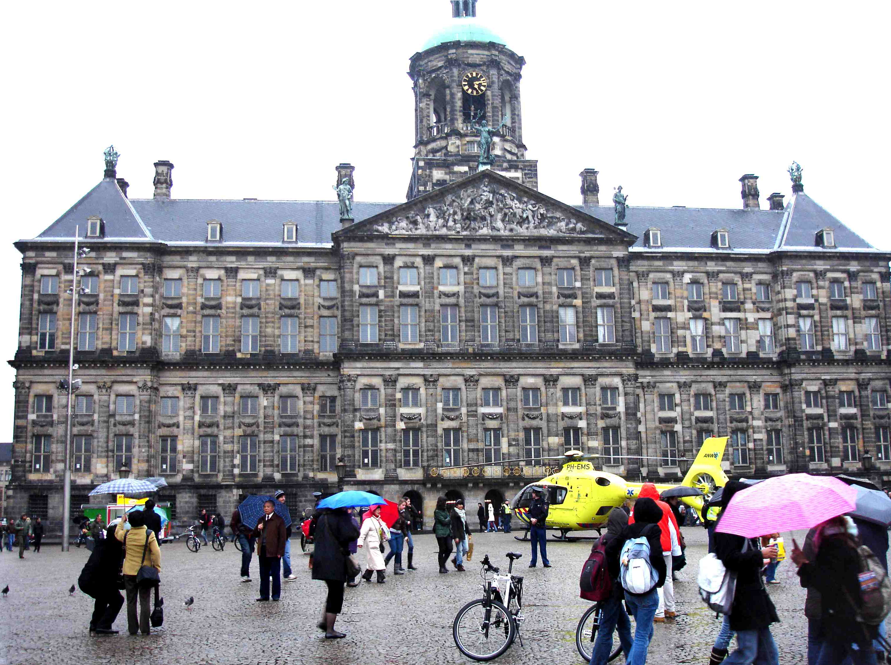 Traumaheli op de Dam